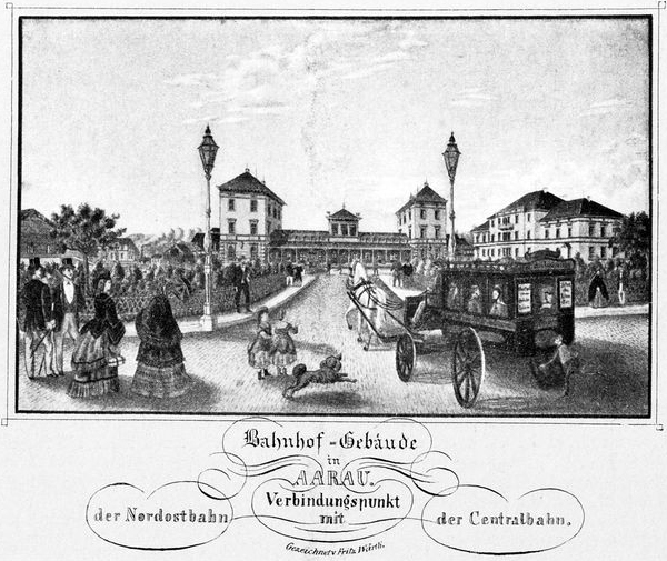 Bahnhof Aarau und Postgebäude um 1870